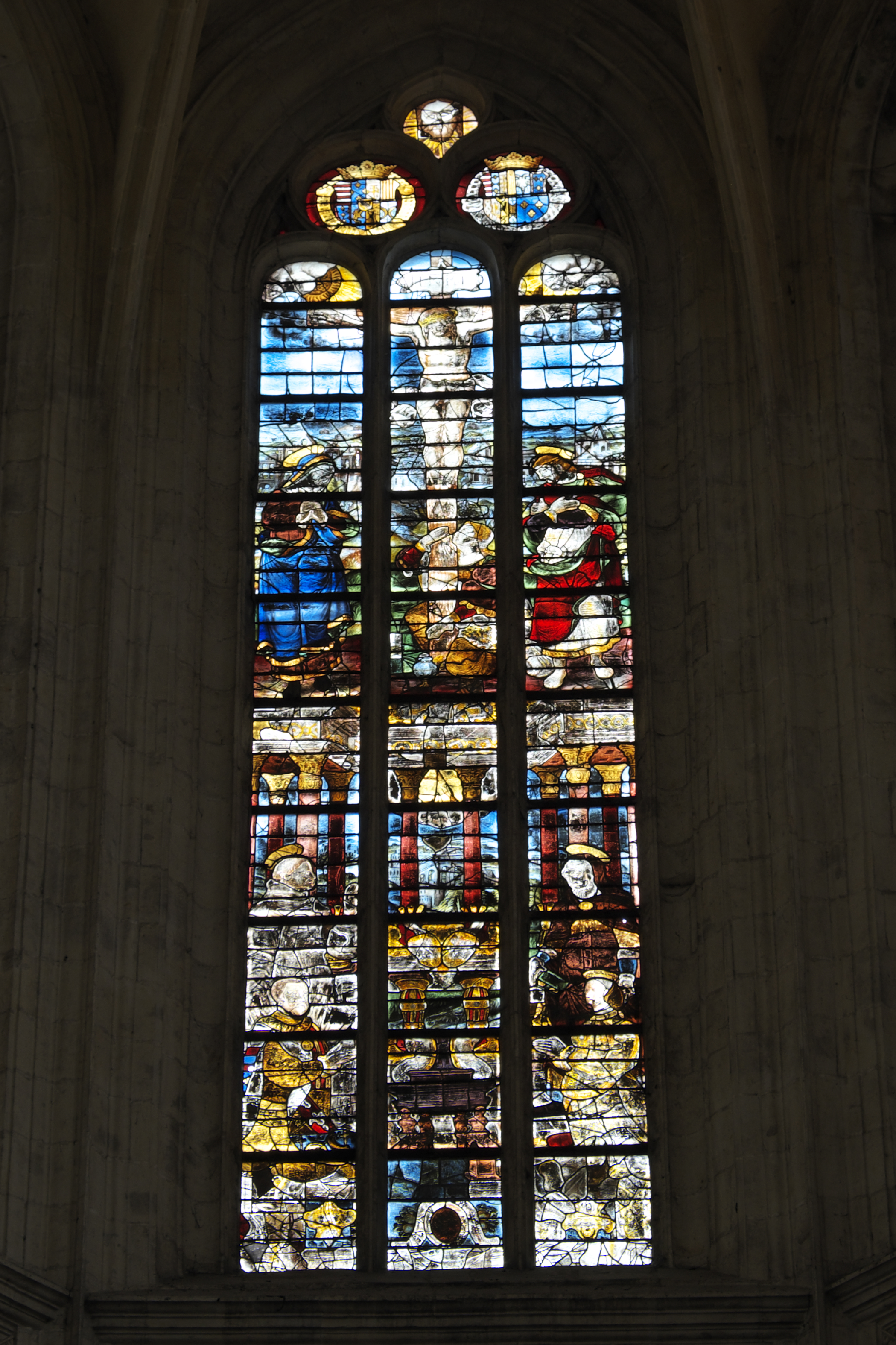 Katholische Pfarrkirche Notre-Dame-des-Marais in La Ferté-Bernard im Département Sarthe (Pays de la Loire/Frankreich), Bleiglasfenster aus dem 16./17. Jahrhundert; Darstellung: Kreuzigung Christi, Stifter